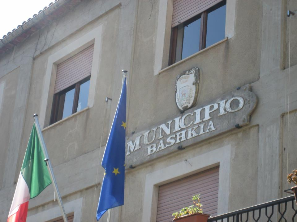 Sede municipale di Civita (CS).